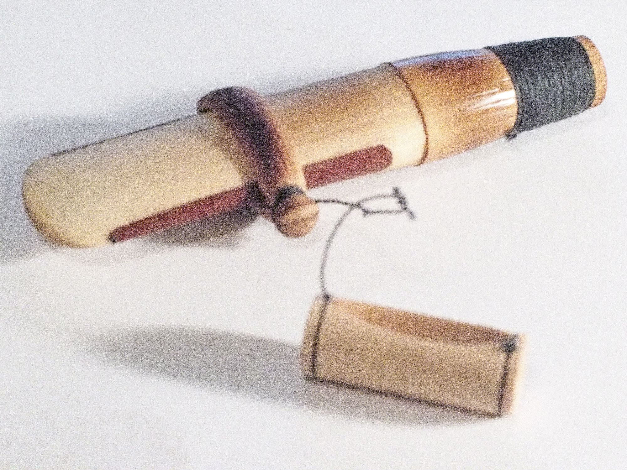 Anche double de doudouk fabriquée par Félix Vartoumyan